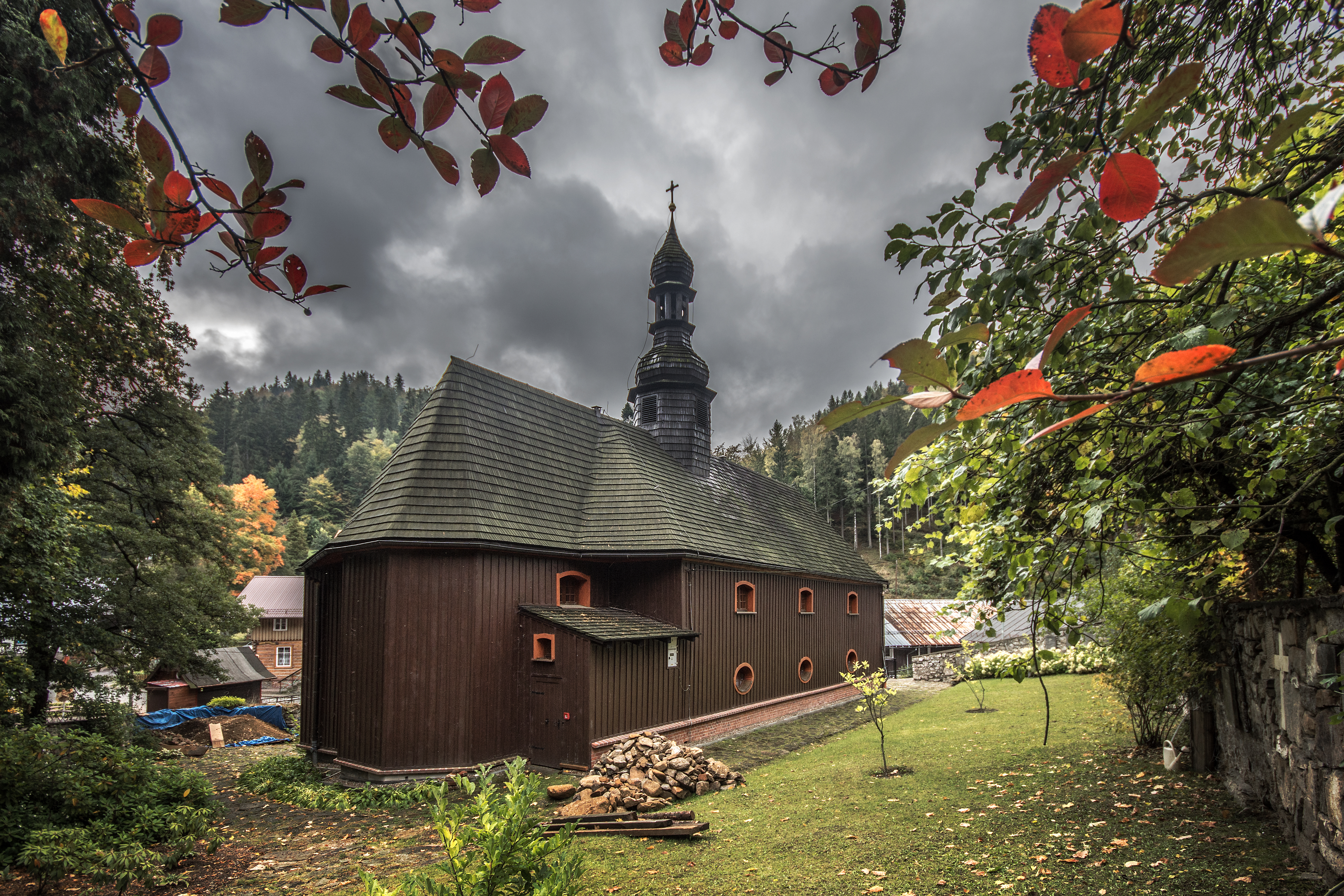 Międzygórze, d. kościół ewangelicki, ob. rzym.-kat. par. pw. św. Józefa, 1740-1742